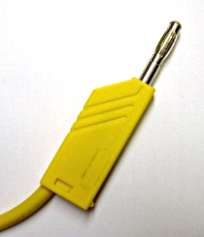 Bananenstecker